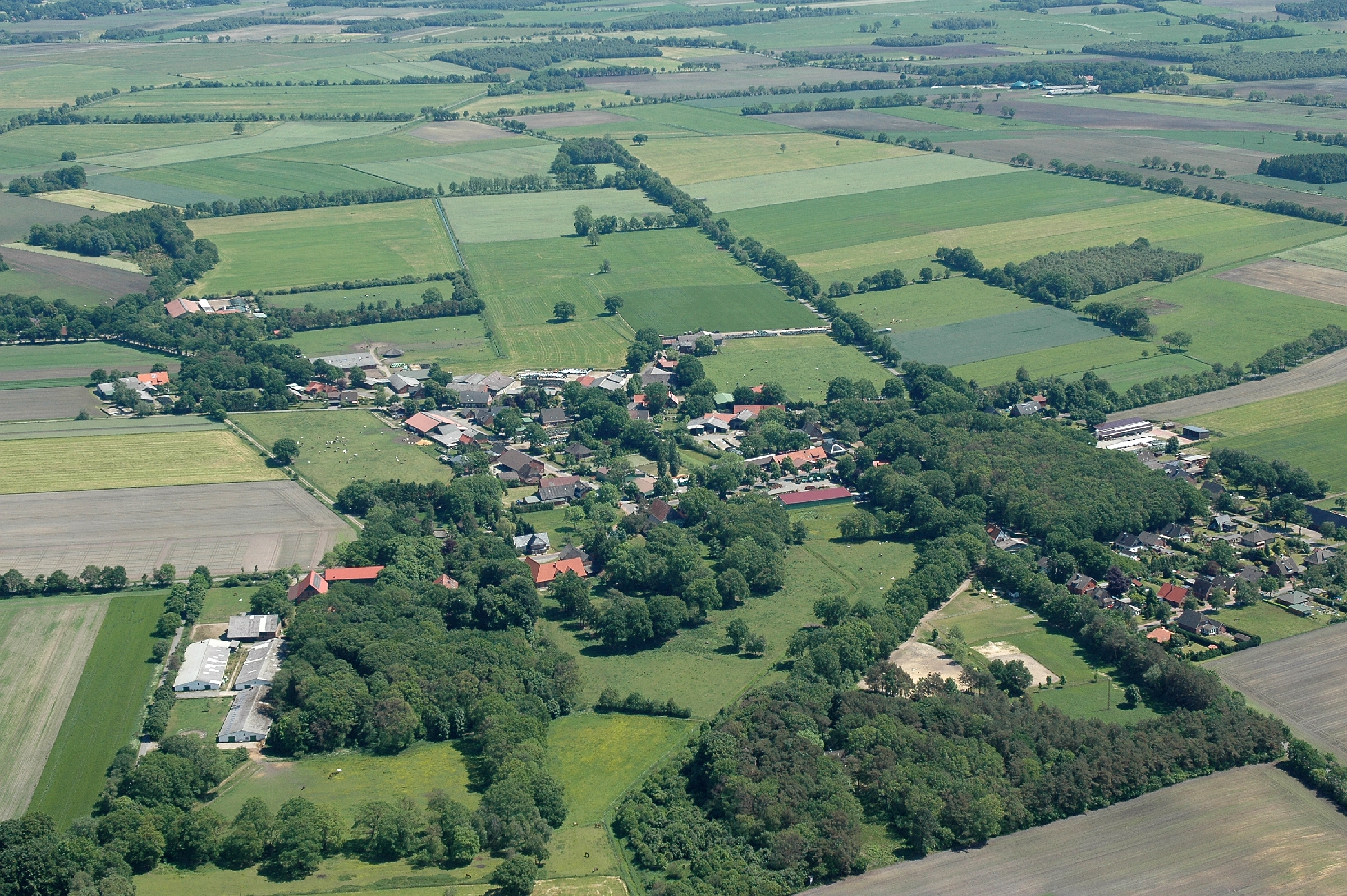 Ankelohe. Aus Serie: Fotoflug vom Flugplatz Nordholz-Spieka über Cuxhaven und Wilhelmshaven